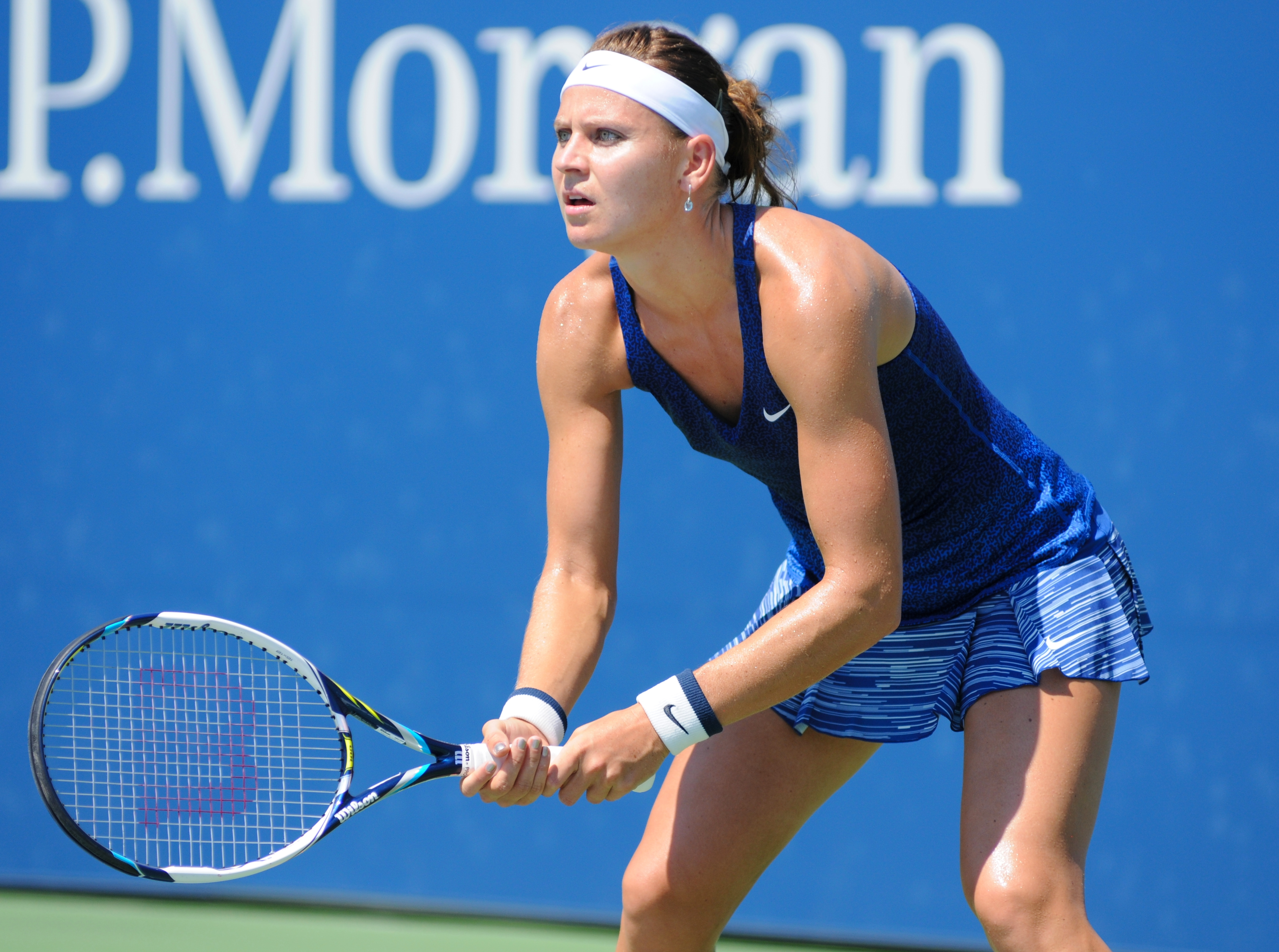 US Open 2014